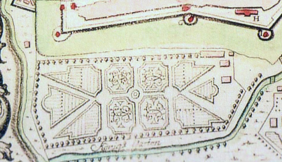 Kupferstich von Celle mit Französischem Garten von 1762